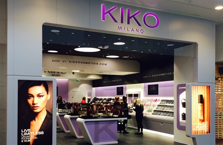 Botiga física